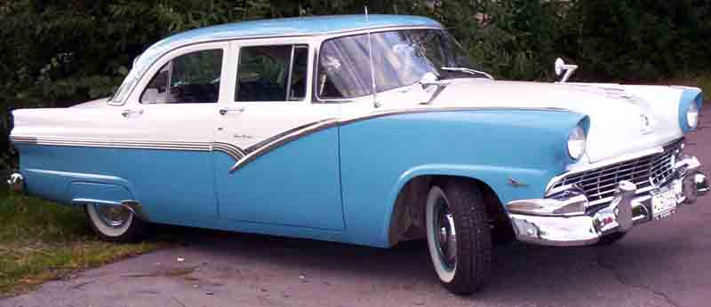 Ford Fairlane 4-Door Sedan 1956